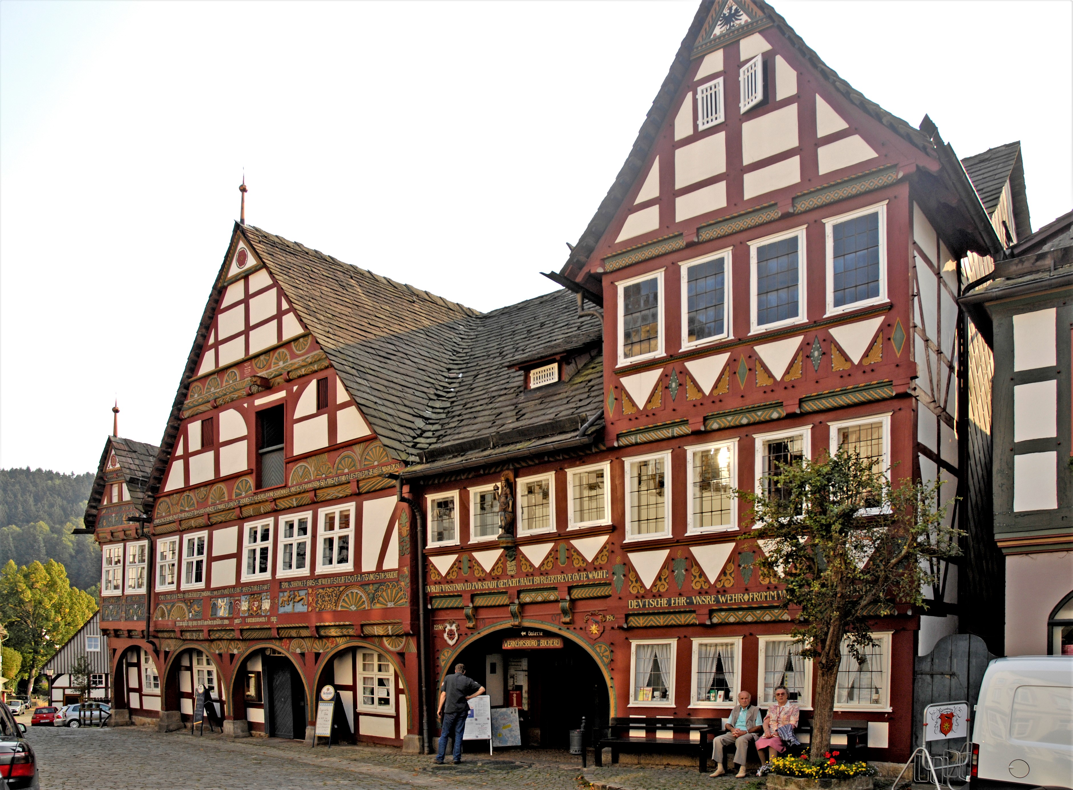 Fachwerkhäuser in Schwalenberg, Schieder-Schwalenberg